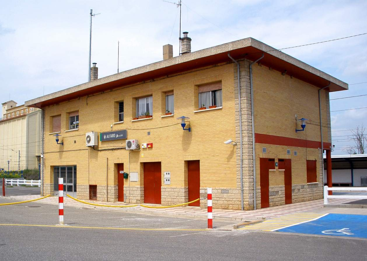 Estación de tren de Alfaro (La Rioja, España).